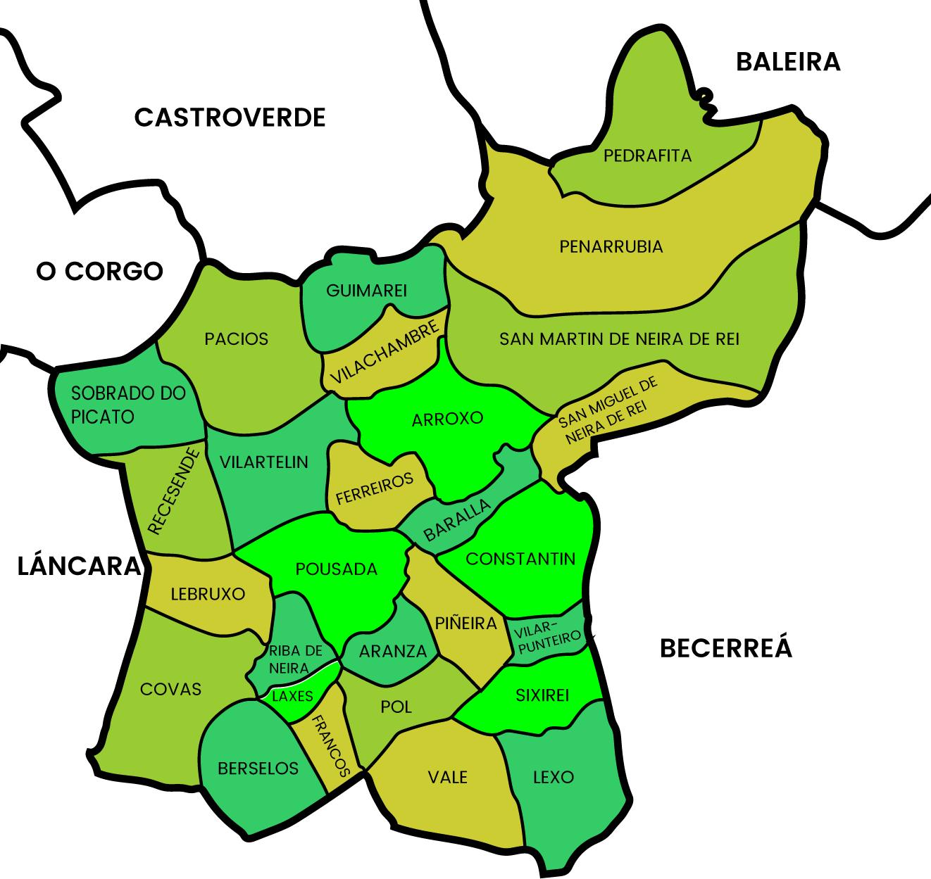 Mapa de las parroquias del ayuntamiento Baralla